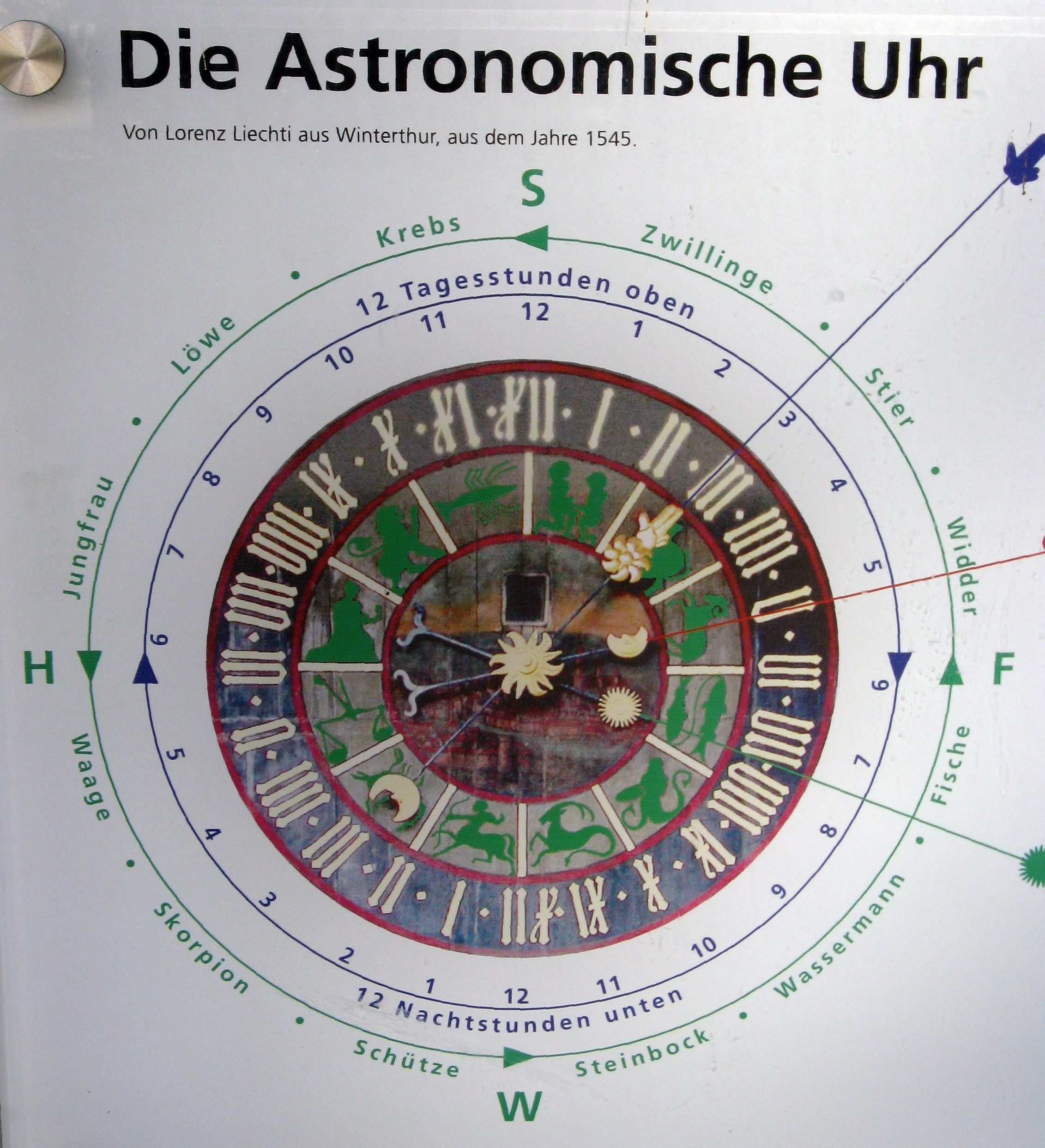 Astronomische Uhr am Roten Turm in Solothurn: Tierkreisuhr, Wandtafelbild